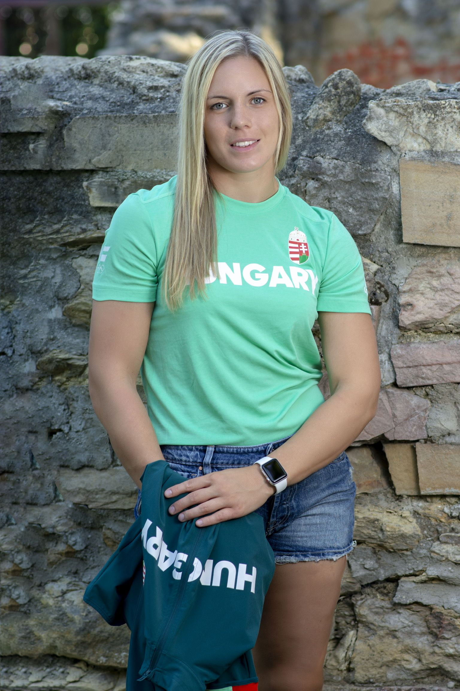 Németh Zsanett magyar birkózó 2019-ben.